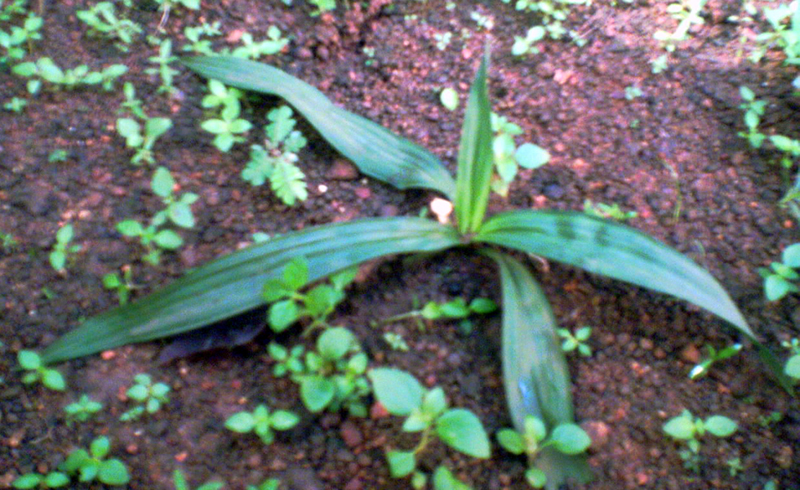 ദശപുഷ്പങ്ങളിലെ നിലപ്പന എന്ന ചെടിയുടെ ചിത്രം സ്വയം എടുത്തത്